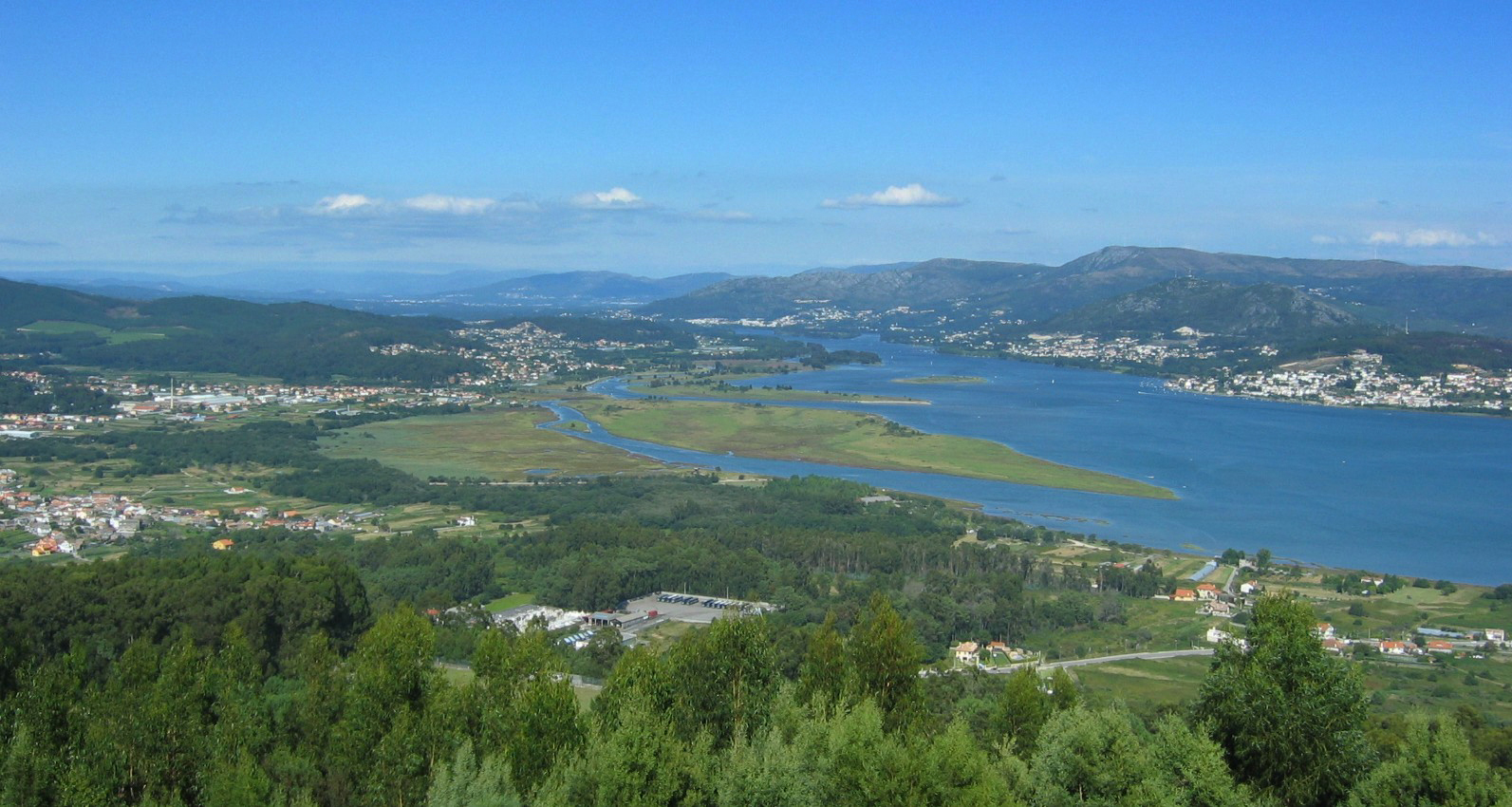 Desembocadura do Miño, desde o monte de Santa Tegra, A Guarda, Galiza